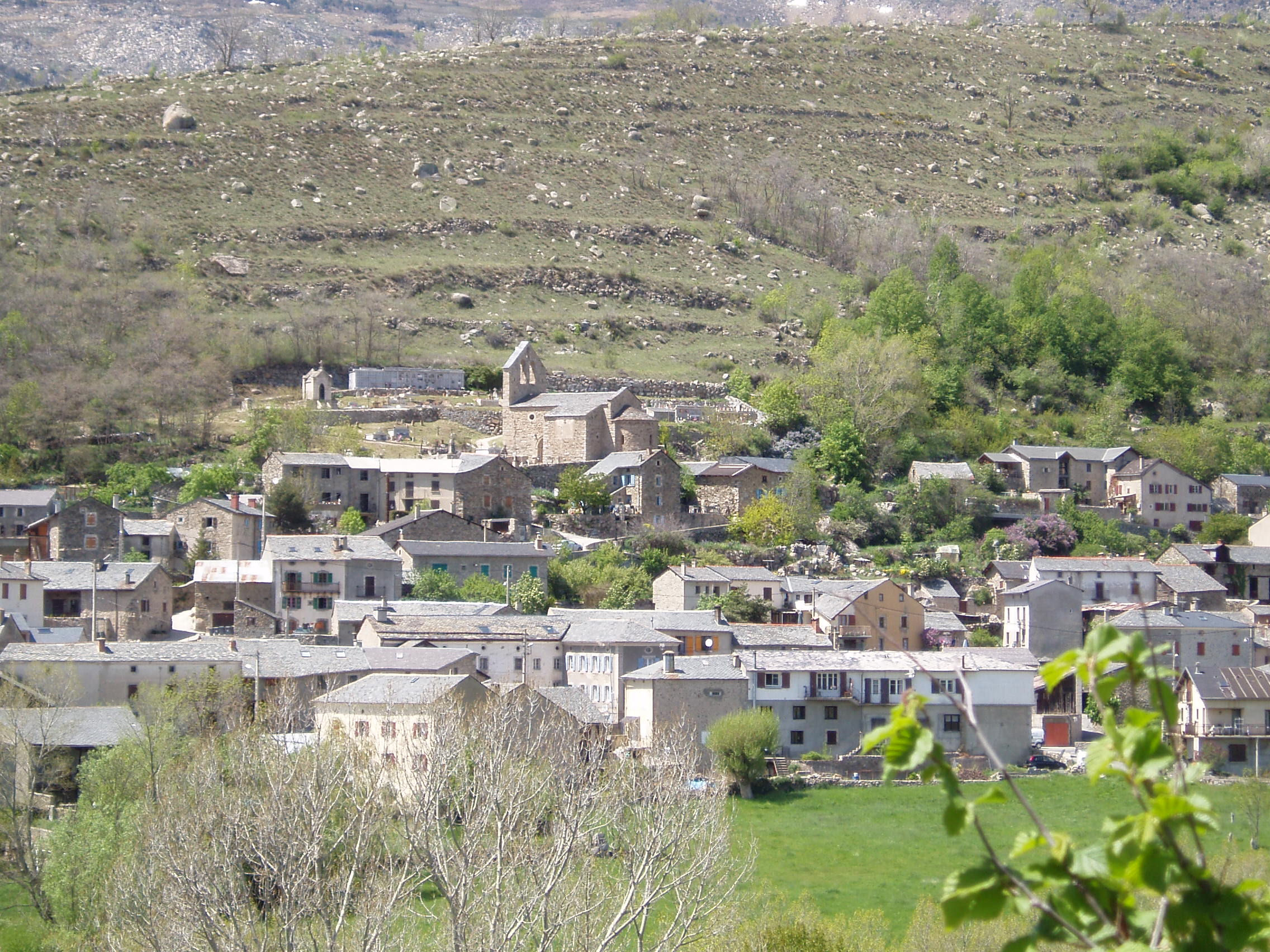 Cal Xandera, Angoustrine-Villeneuve-des-Escaldes, Pyrénées-Orientales, Languedoc-Roussillon (France)